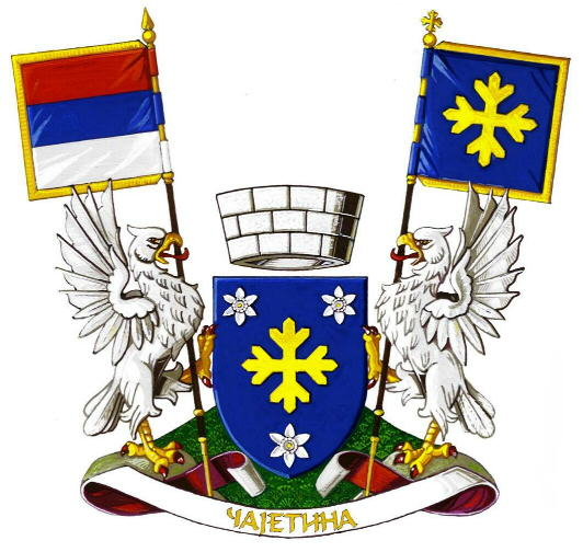 Blason de la ville de Čajetina en Serbie